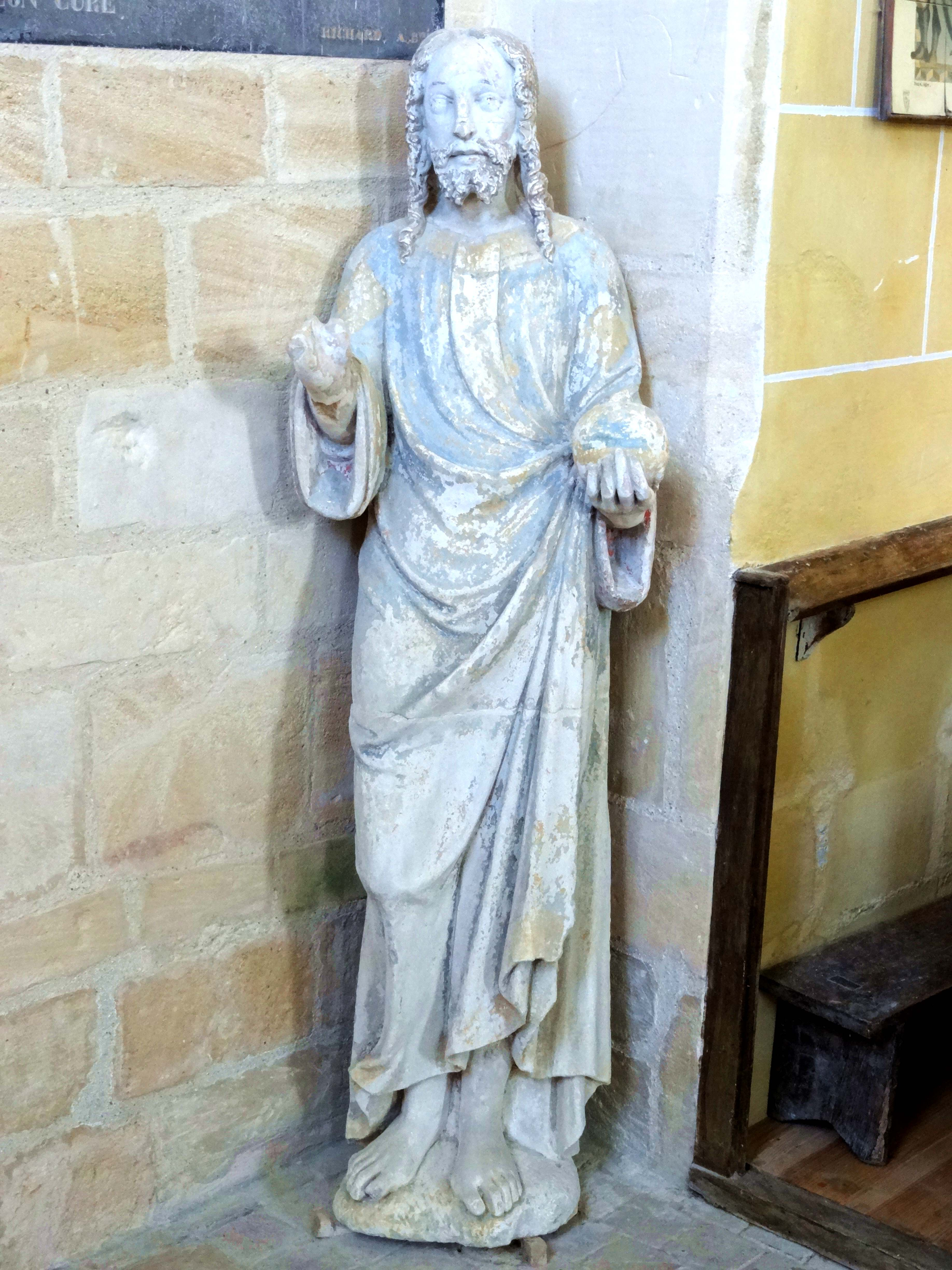 Mobilier de l'église - voir titre.